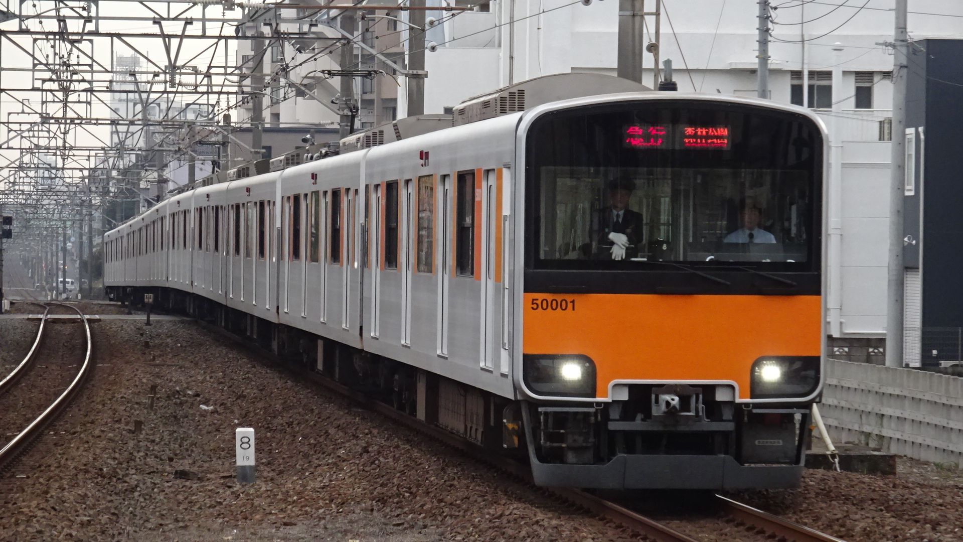 鶴瀬駅に入線する東武50000系試作車